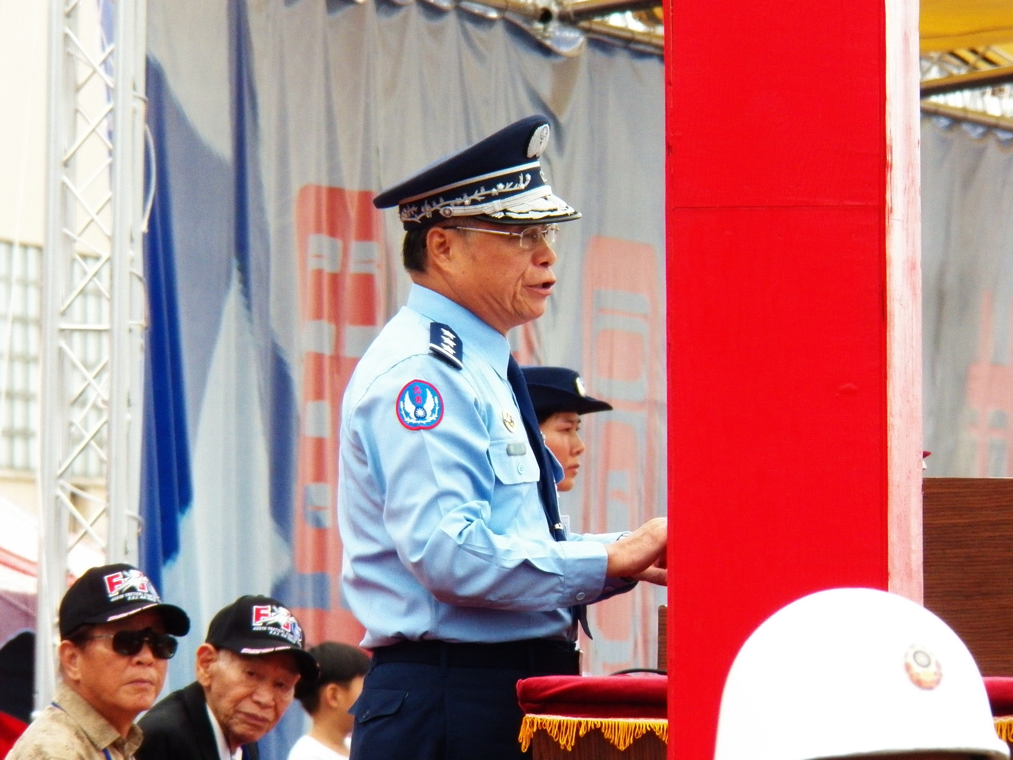 2012空軍嘉義基地營區開放活動，空軍司令嚴明上將開場致辭。